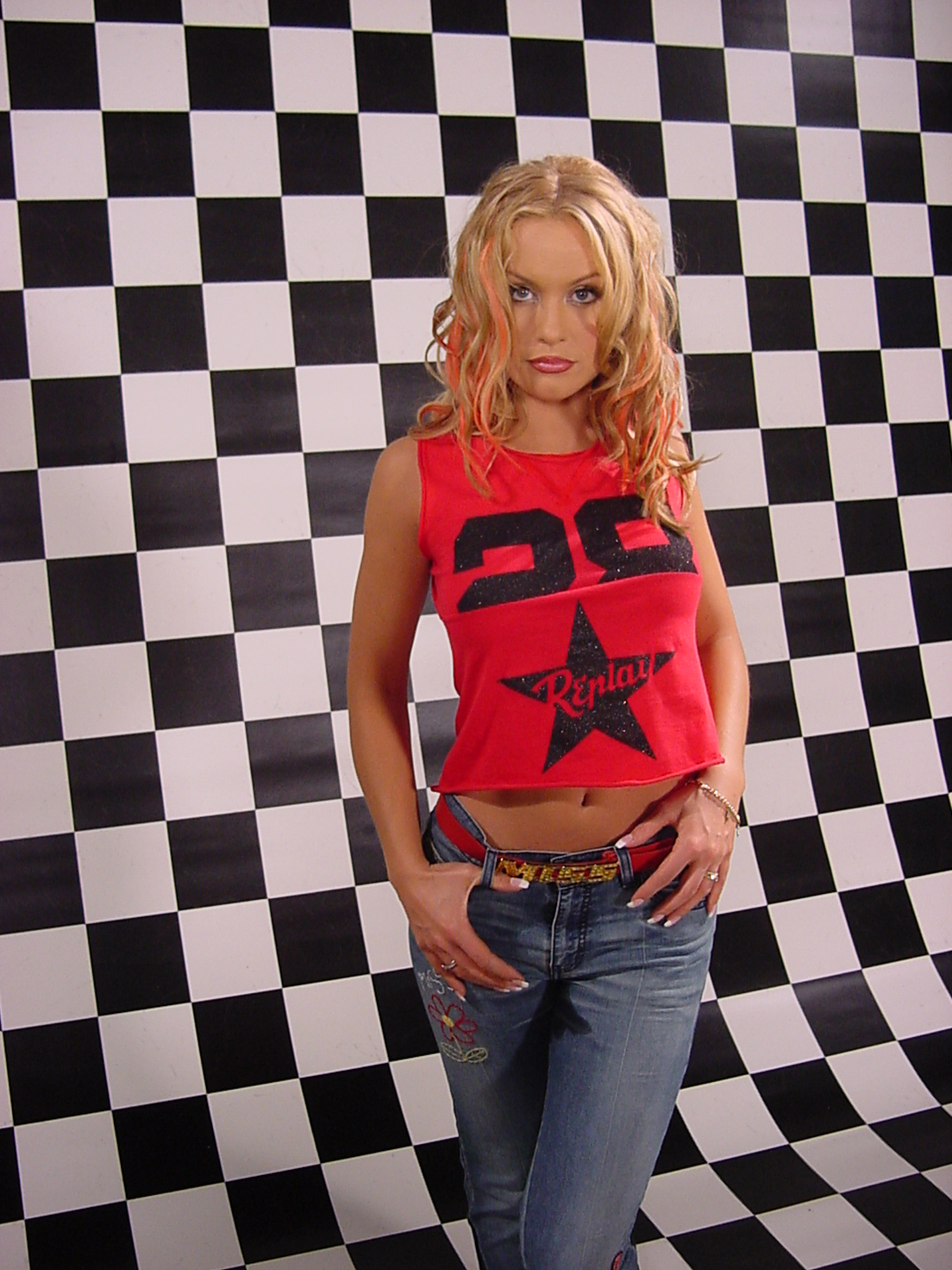 Rollergirl (Nicci Juice) in Videoaufnahmen von Close to You